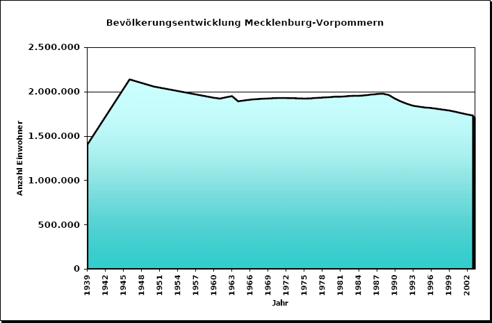 Bevölkerungsentwicklung Mecklenburg-Vorpommern